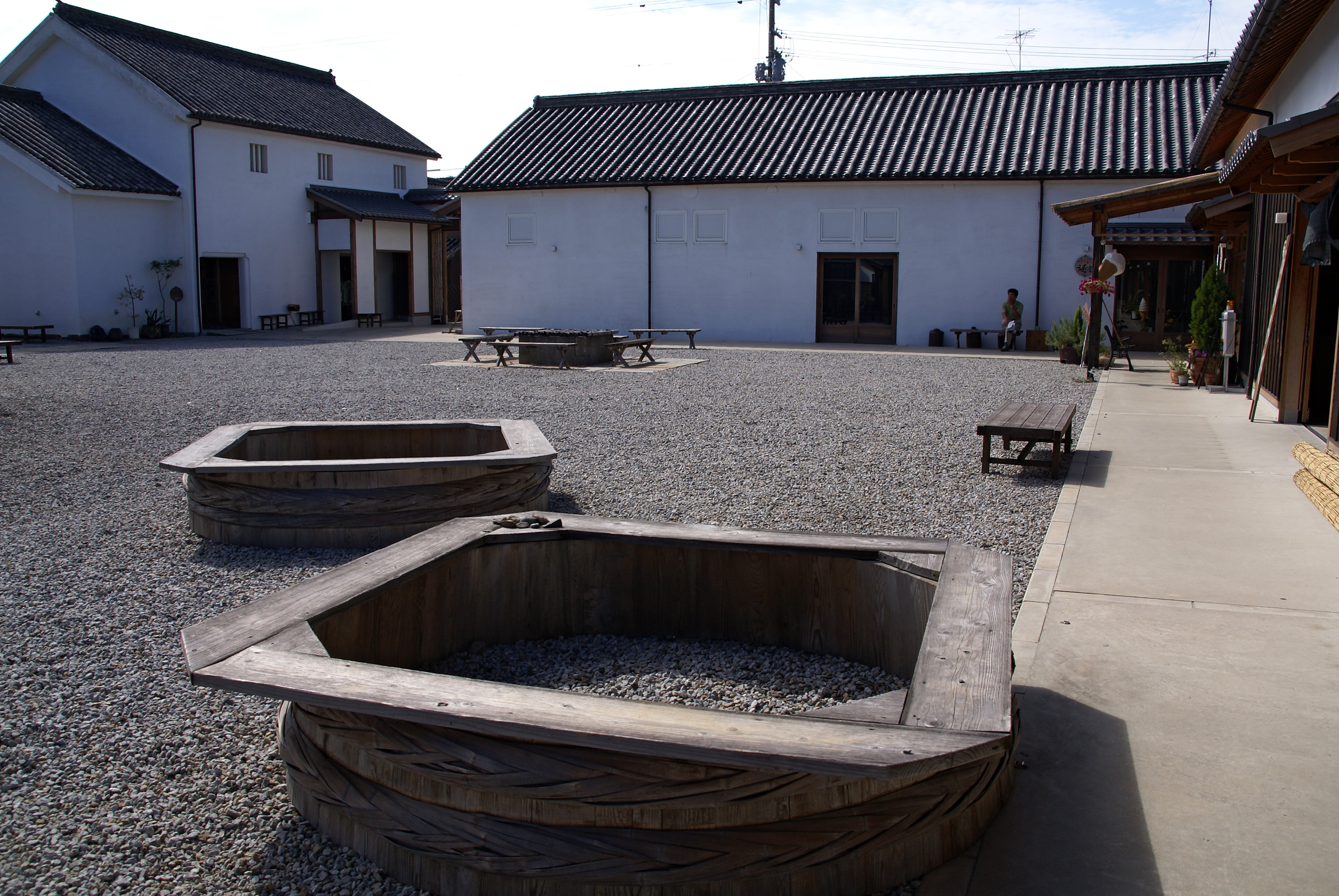 Sanshu Idutsu-yashiki in Hiketa, Higashikagawa, Kagawa prefecture, Japan